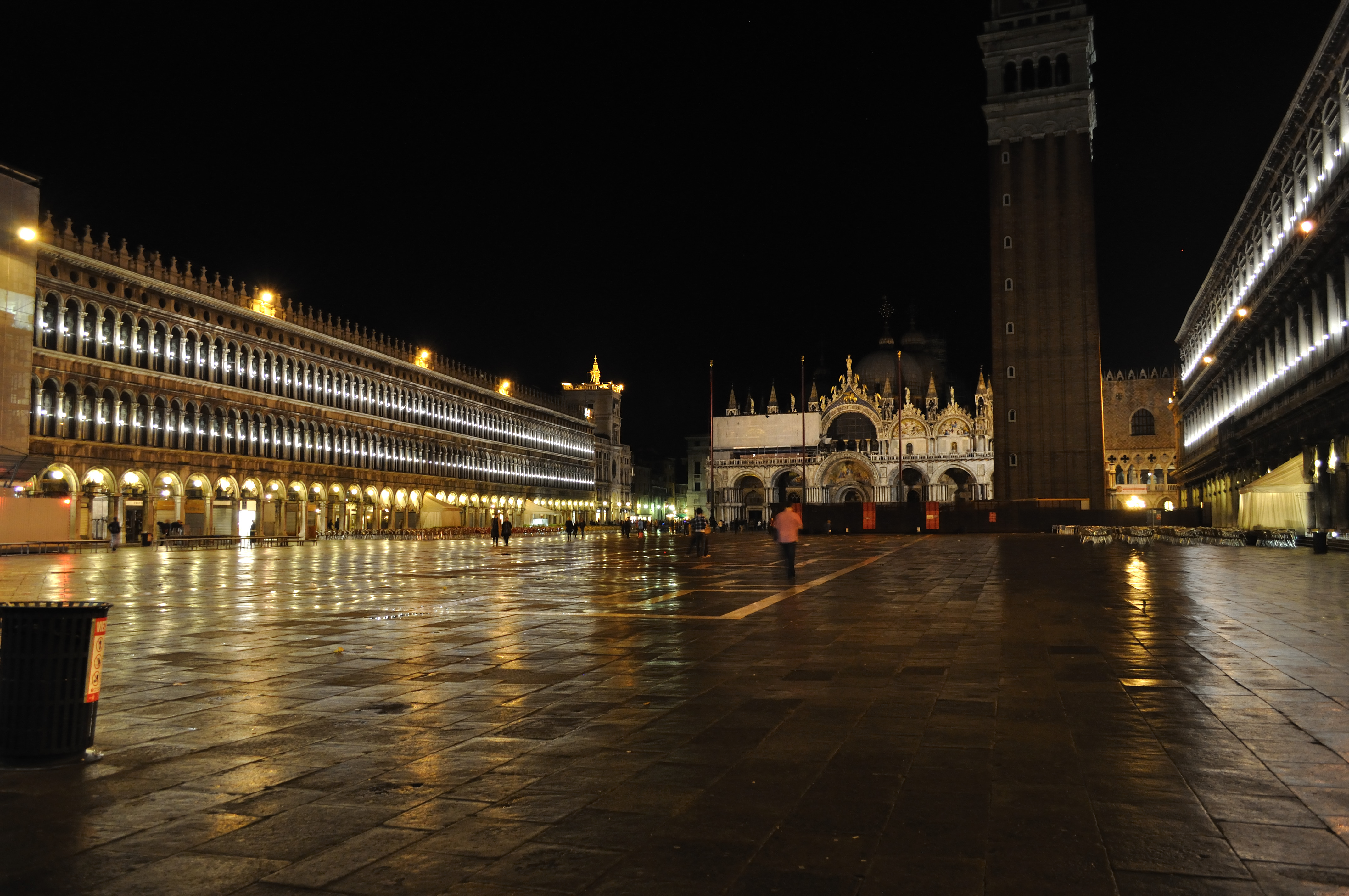 Piazza San Marco in the Night 夜のサン・マルコ広場, ヴェネツィア